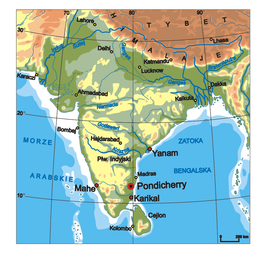 Mapa rozmieszczenia regionów terytorium Pondicherry. Autor: Aotearoa